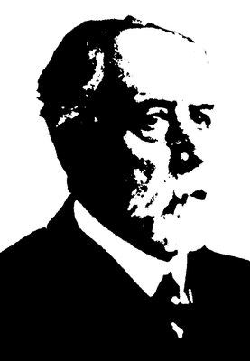 Pin i Soler